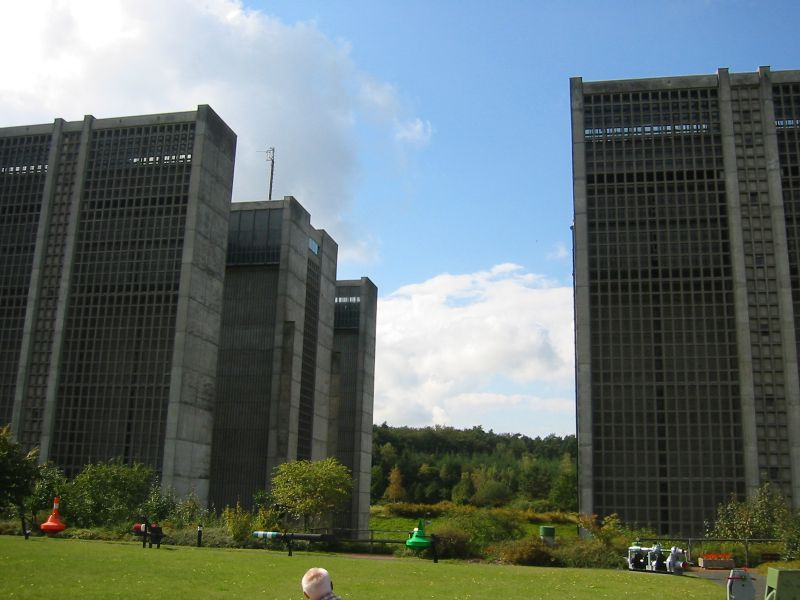 Schiffshebewerk in Scharnebeck eigene Aufnahme 19.09.2004